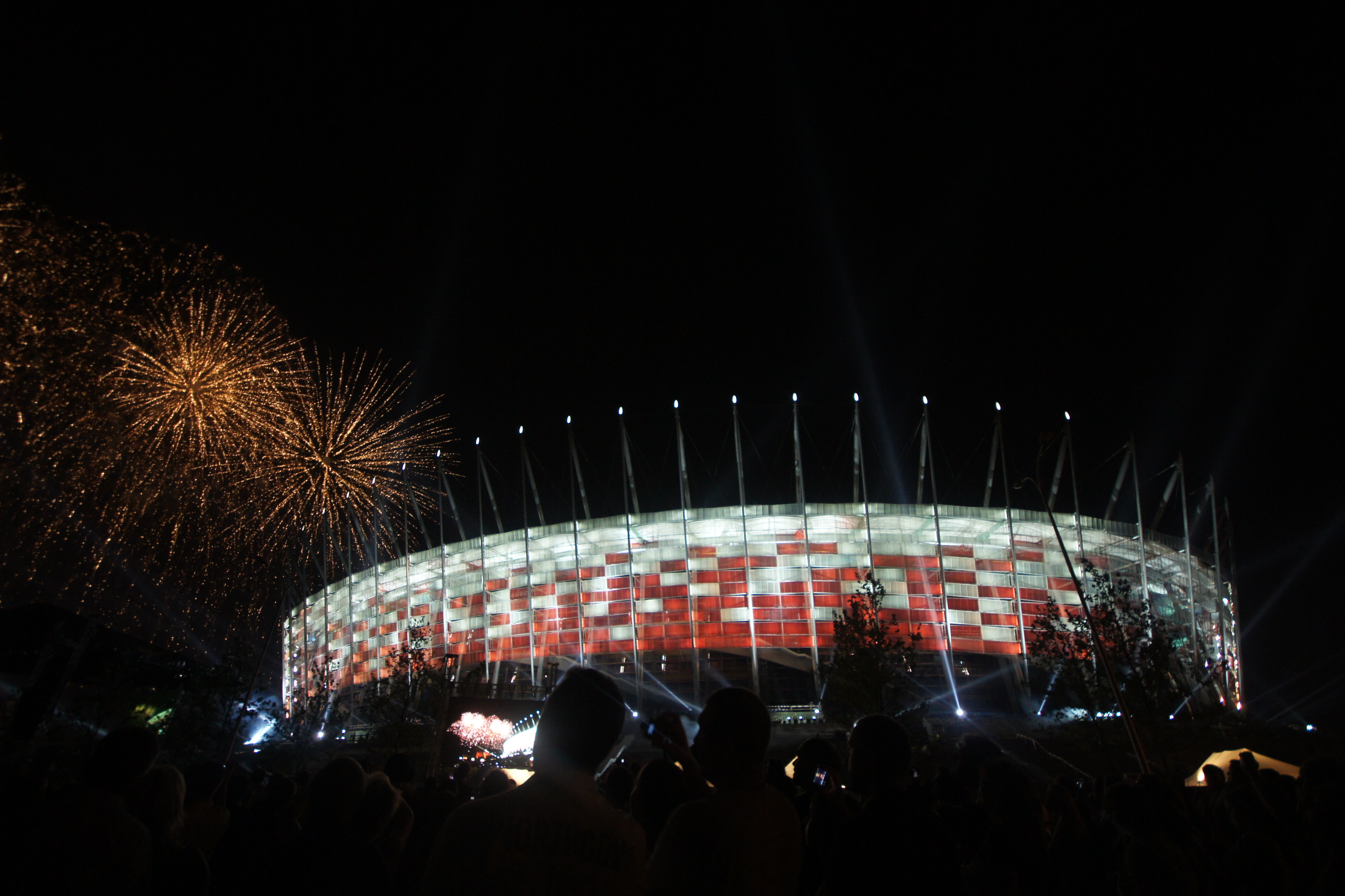 Stadion Narodowy w czasie pokazu świetlnego